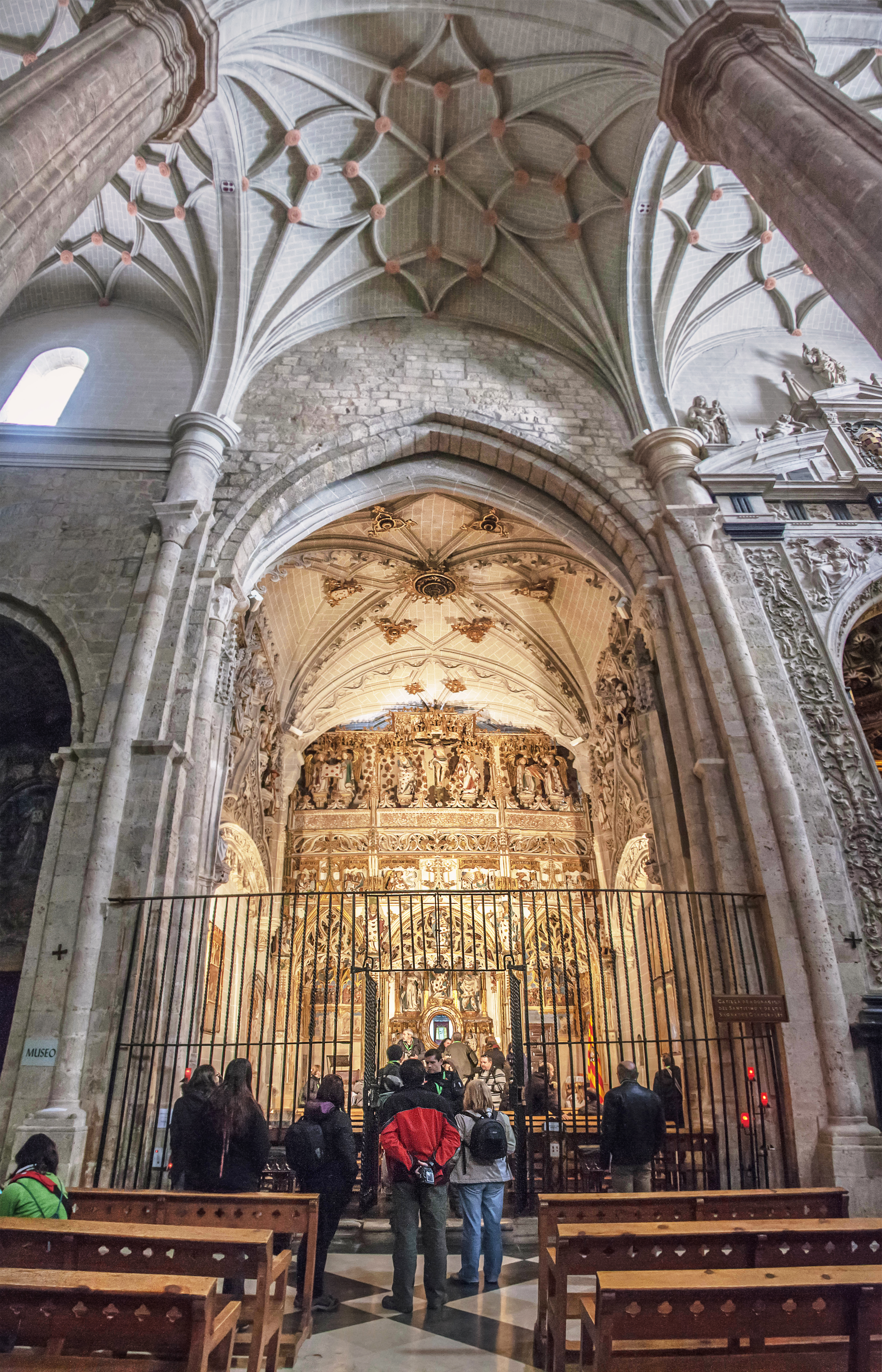 Daroca, España